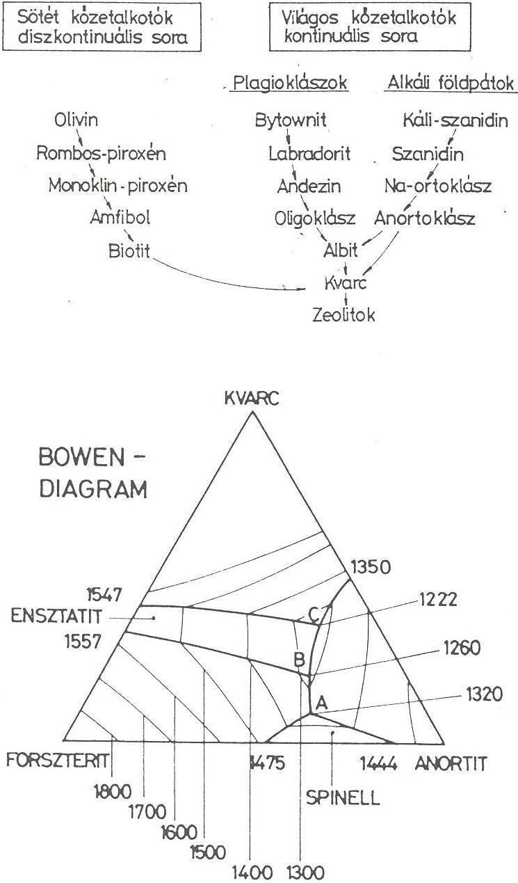 A Bowen diagram és a magmás ásványok Bowen-féle sorozata